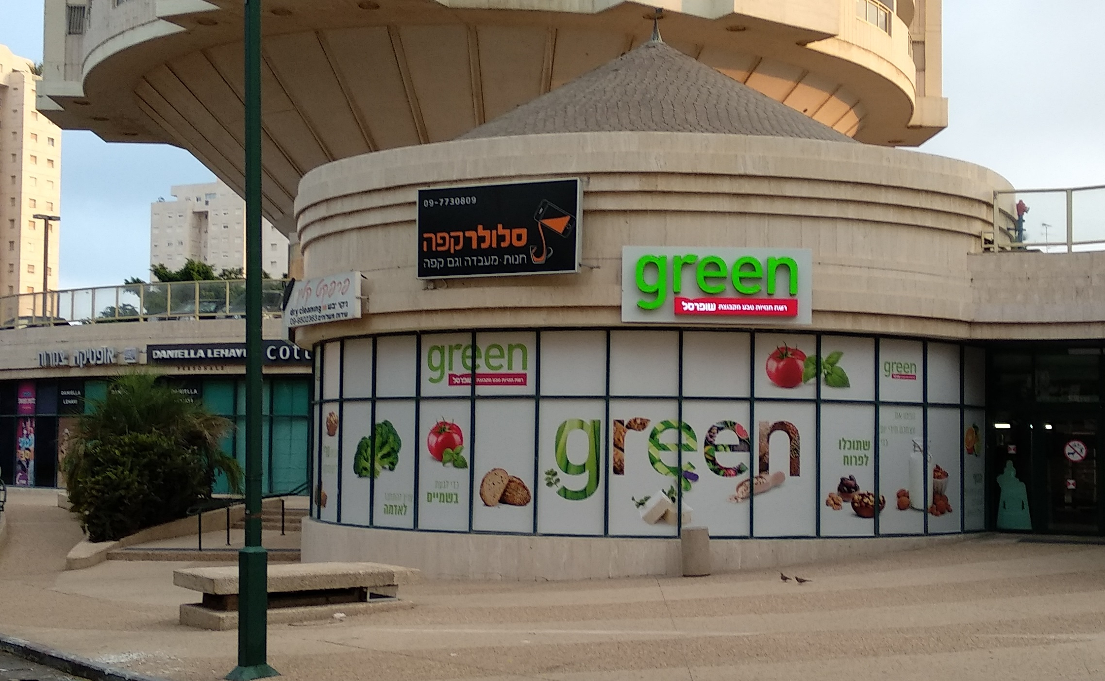 סניף "שופרסל green" במרכז צמרות, הרצליה